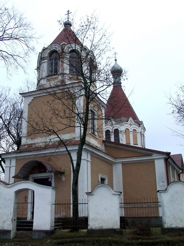 Trakų Švč. Dievo Motinos Gimimo cerkvė